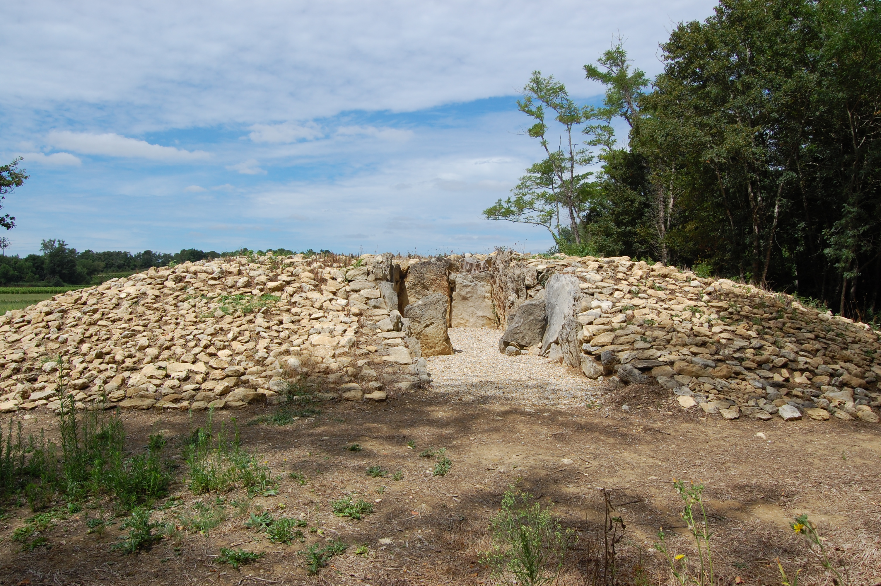 Dolmen de Barbehère (Inscrit) .